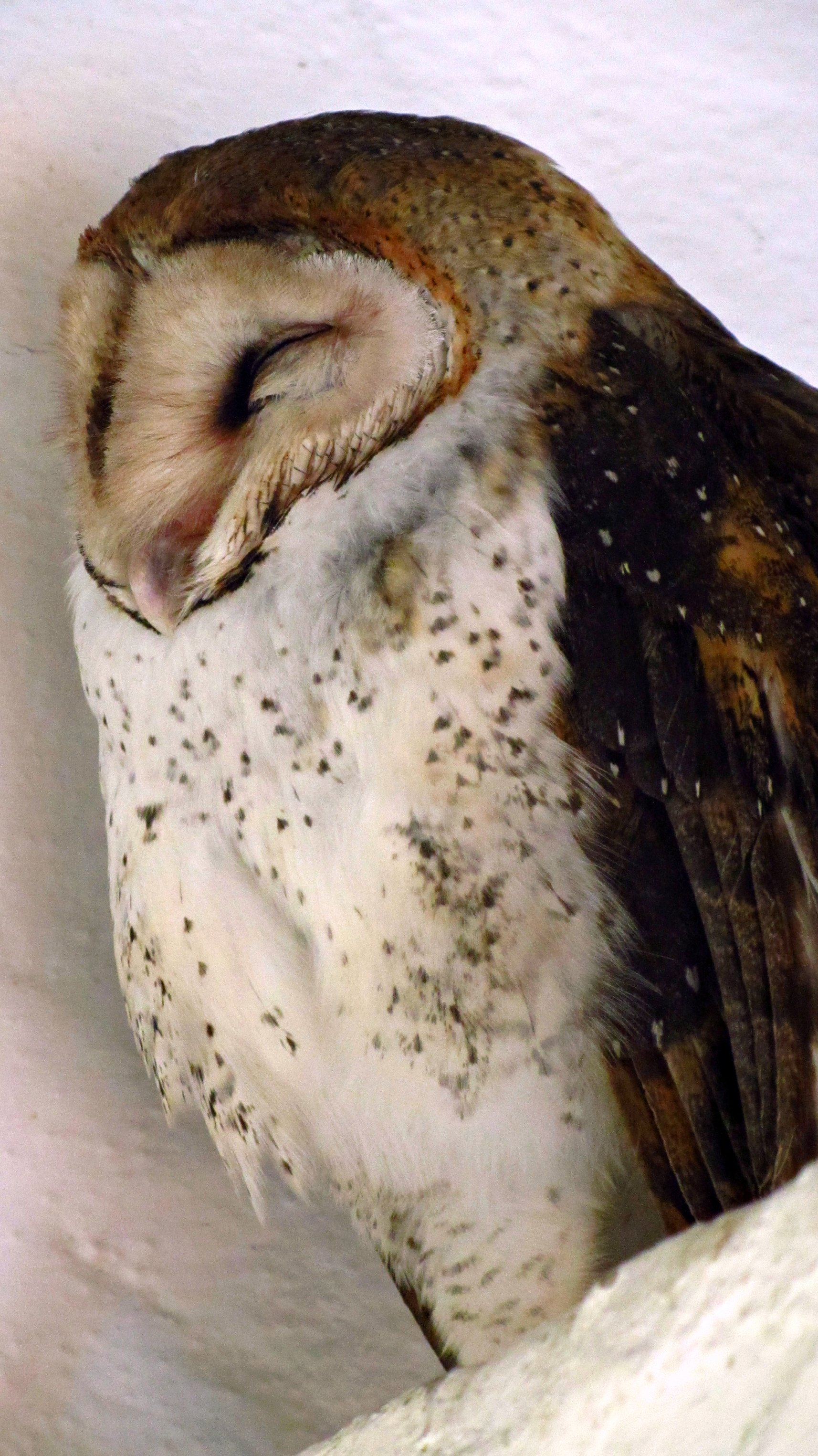 Galapagos Barn Owl Tyto alba punctatissima, Santa Cruz Island, Galapagos Islands.